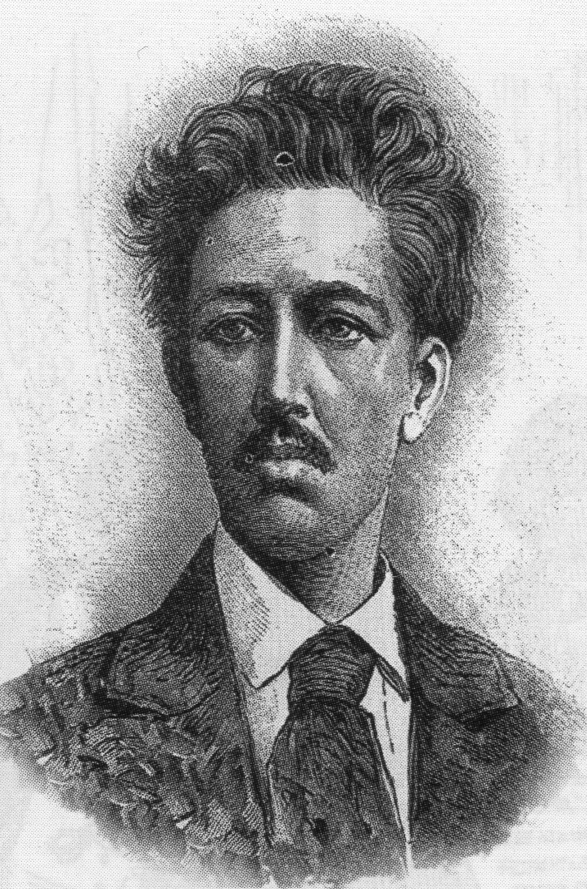 Manuel Acuña, escritor mexicano. Grabado tomado del libro Poesías, París, Librería de Garner Hermanos 1890.